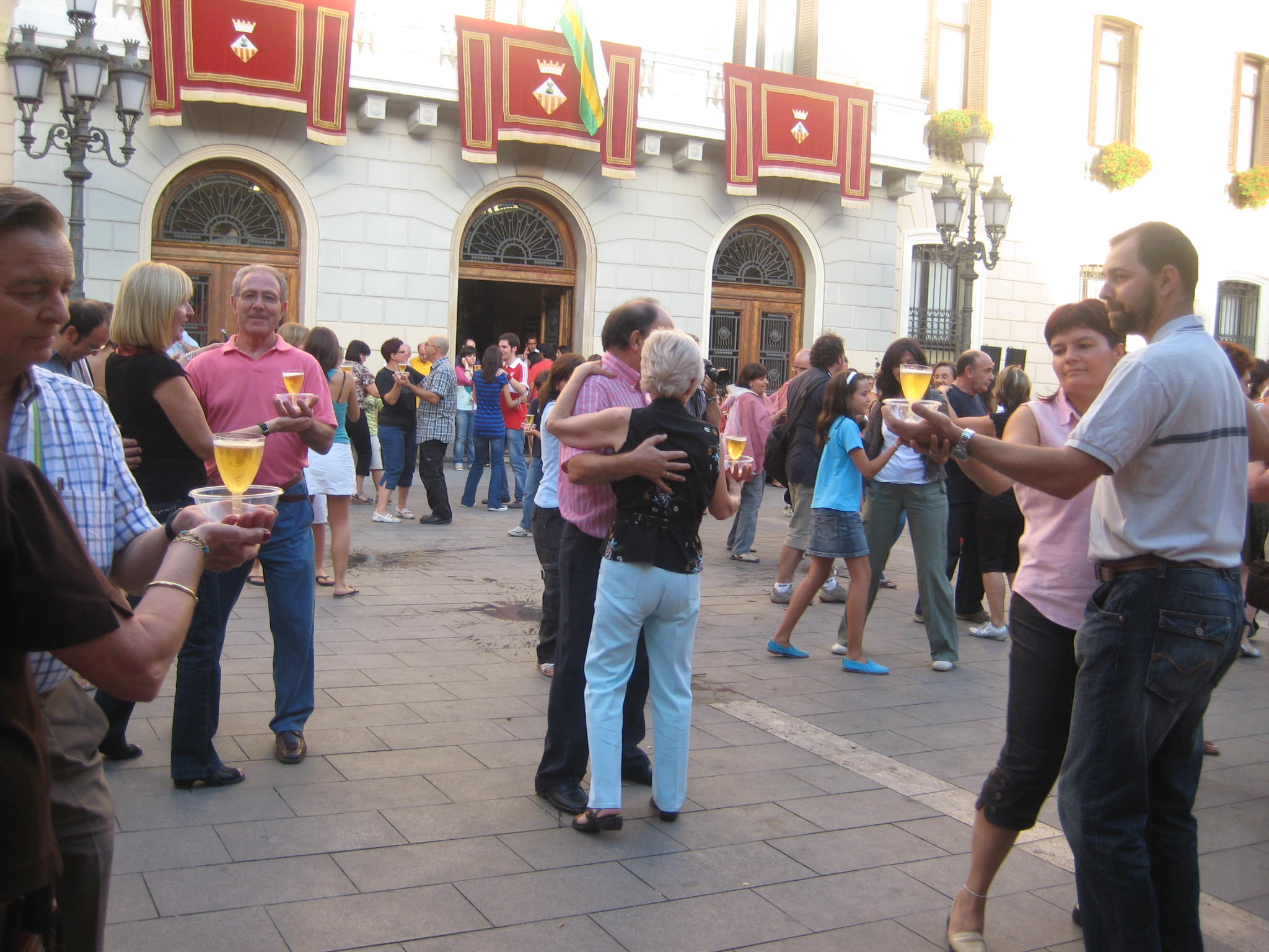 Ball de la bola a la Festa major de Sabadell de 2007. Les parelles ballen amb una copa de bola. Al fons, l'ajuntament amb els domassos de gala als balcons.